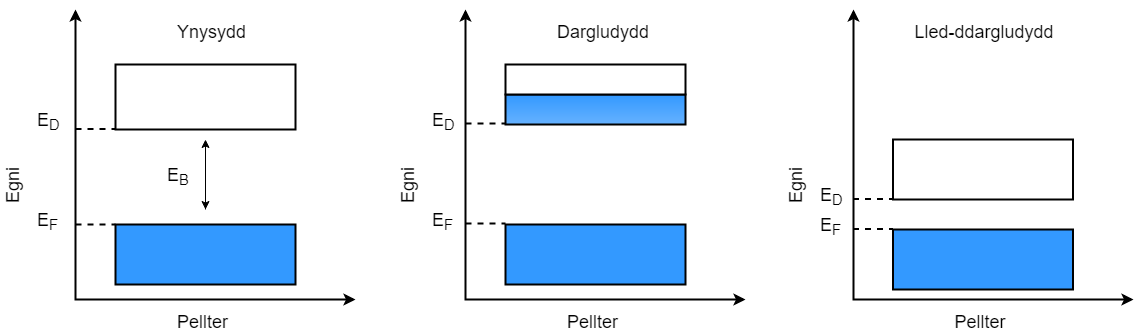 Dangos lefelau egni y bandiau dargludo a falens, a'r gwahaniaeth rhwng dargludydd, ynysydd, a lled-ddargludydd.